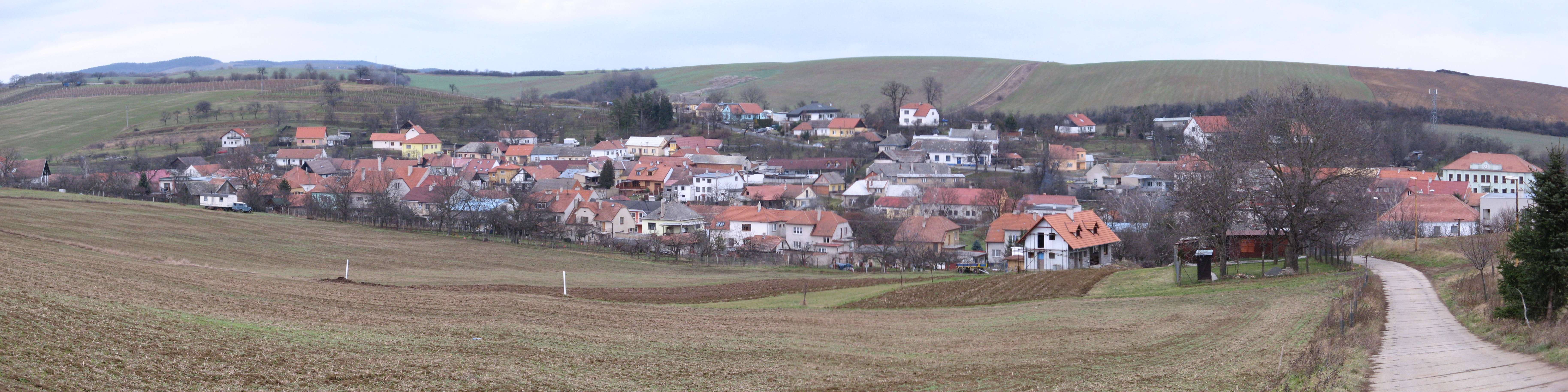 Obec Modrá, okres Uherské Hradiště.